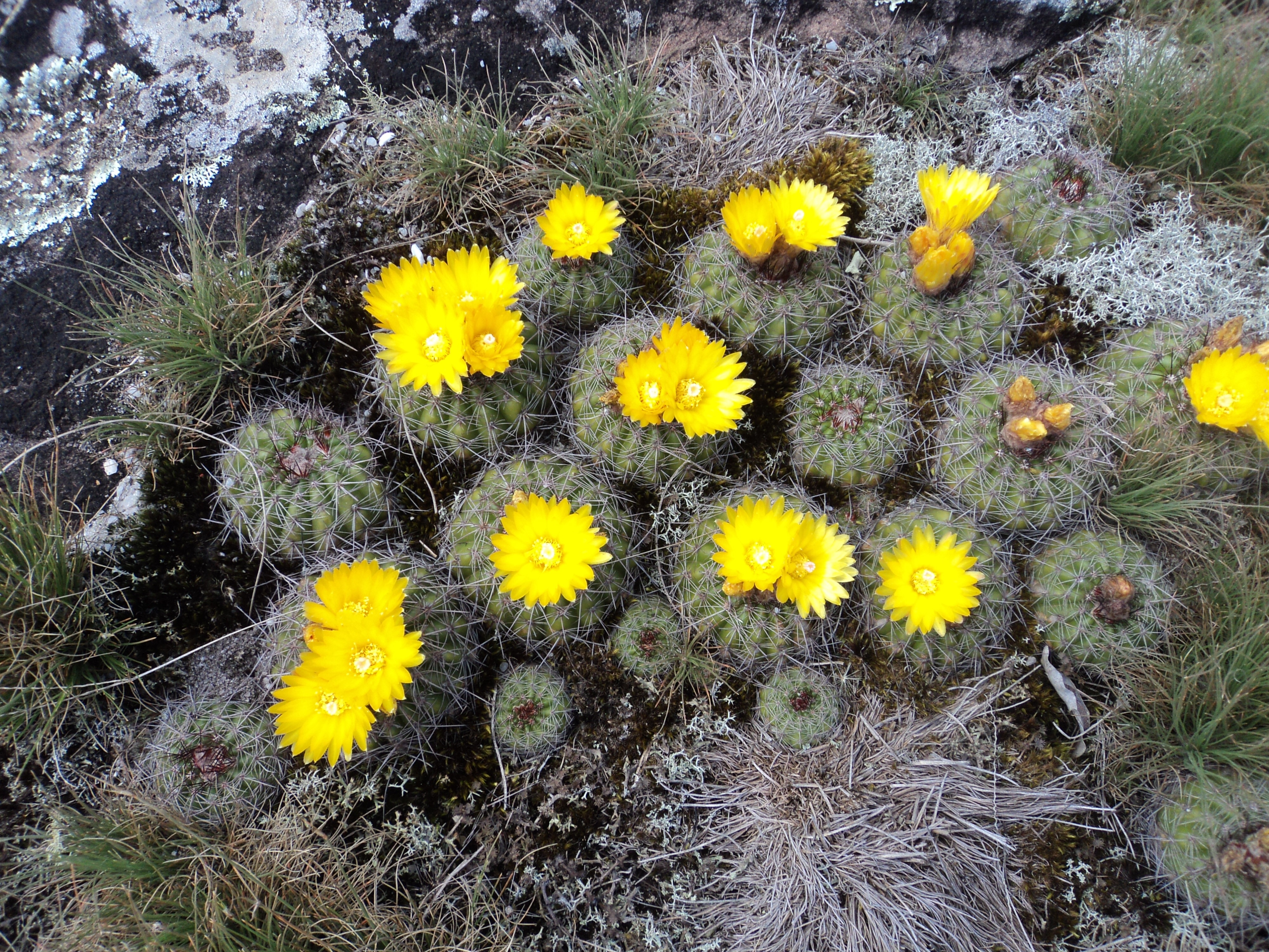 Rio Grande do Sul, Brasil